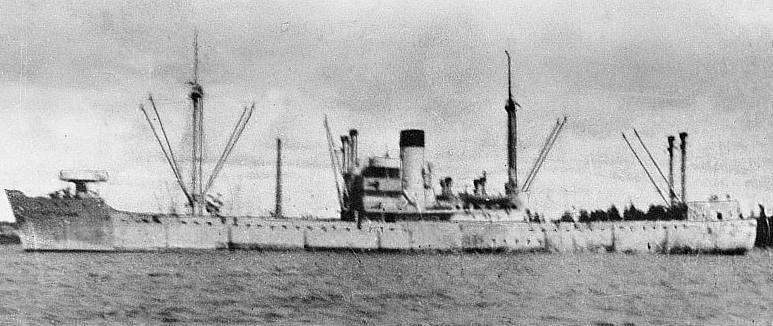 Das Einheitsfrachtschiff KATTENTURM vom Typ HansaA